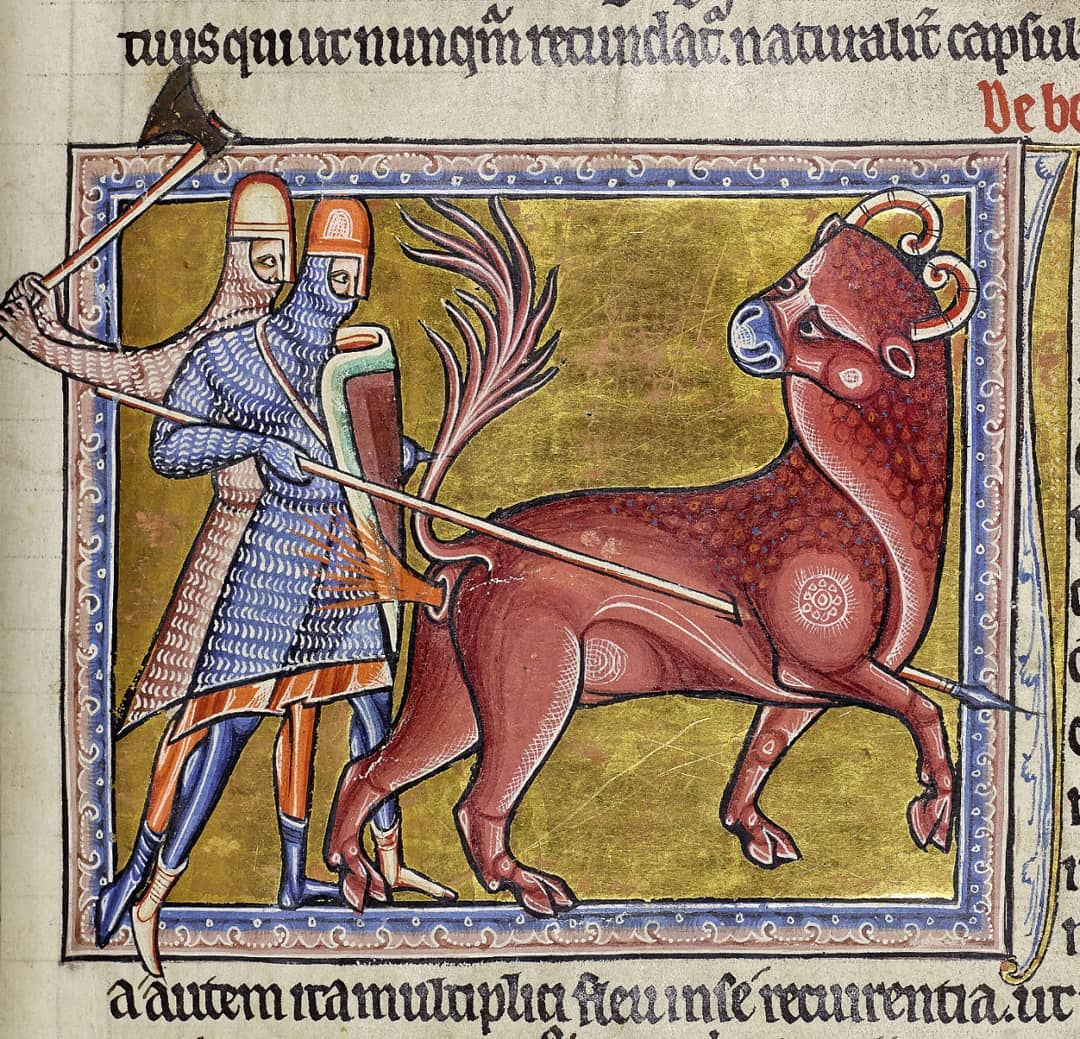 Bestia representada en un bestiario medieval en que se representa un Bonnacon